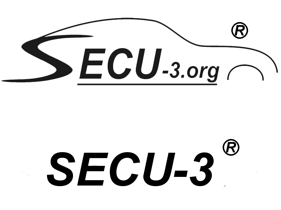 Логотипы проекта SECU-3